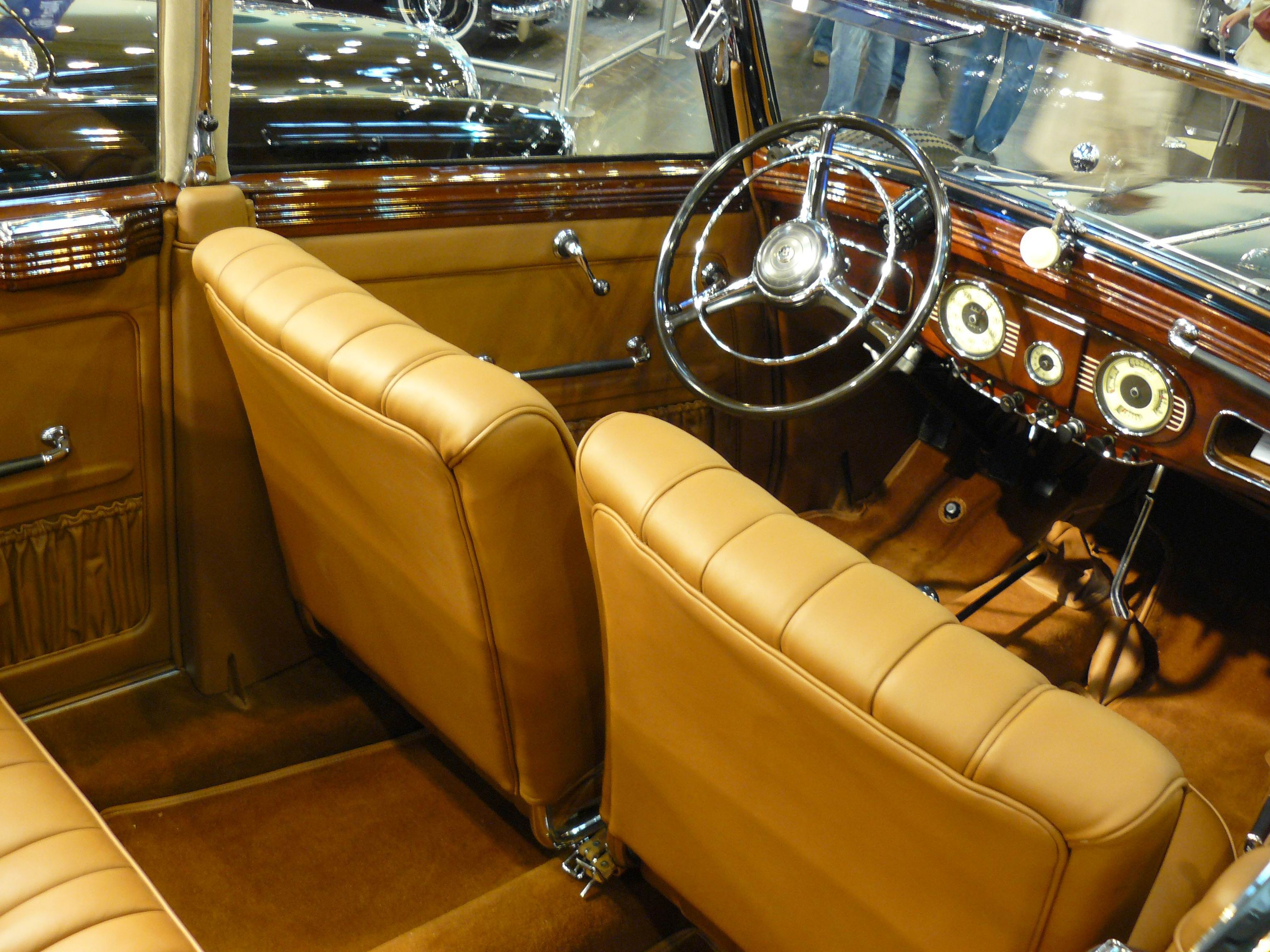 Essen 2011